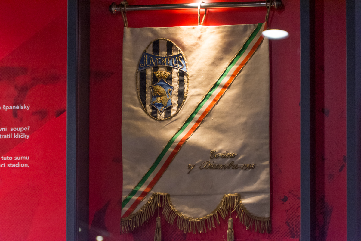 SK Slavia Praha Club Museum - Juventus pennant